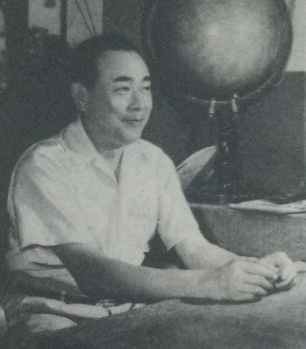 富岡定俊